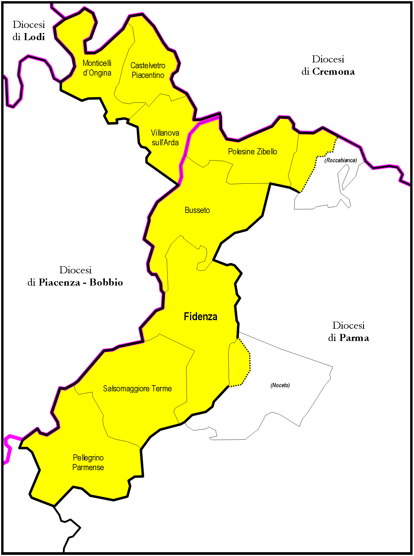 Mappa della Diocesi di Fidenza